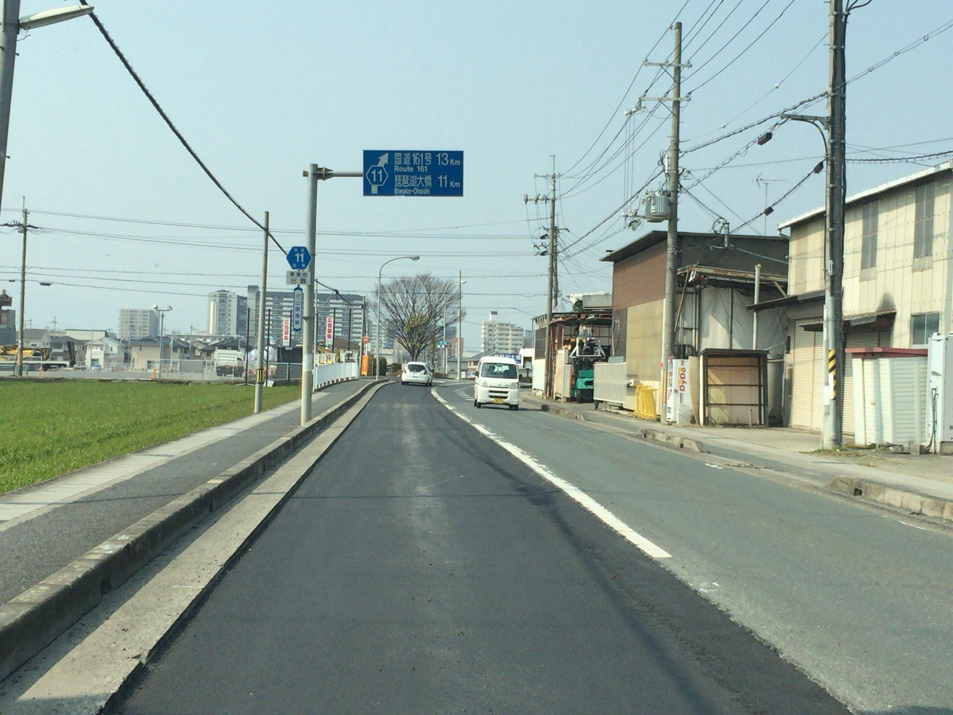 滋賀県道11号守山栗東線で、栗東市出庭（でば）